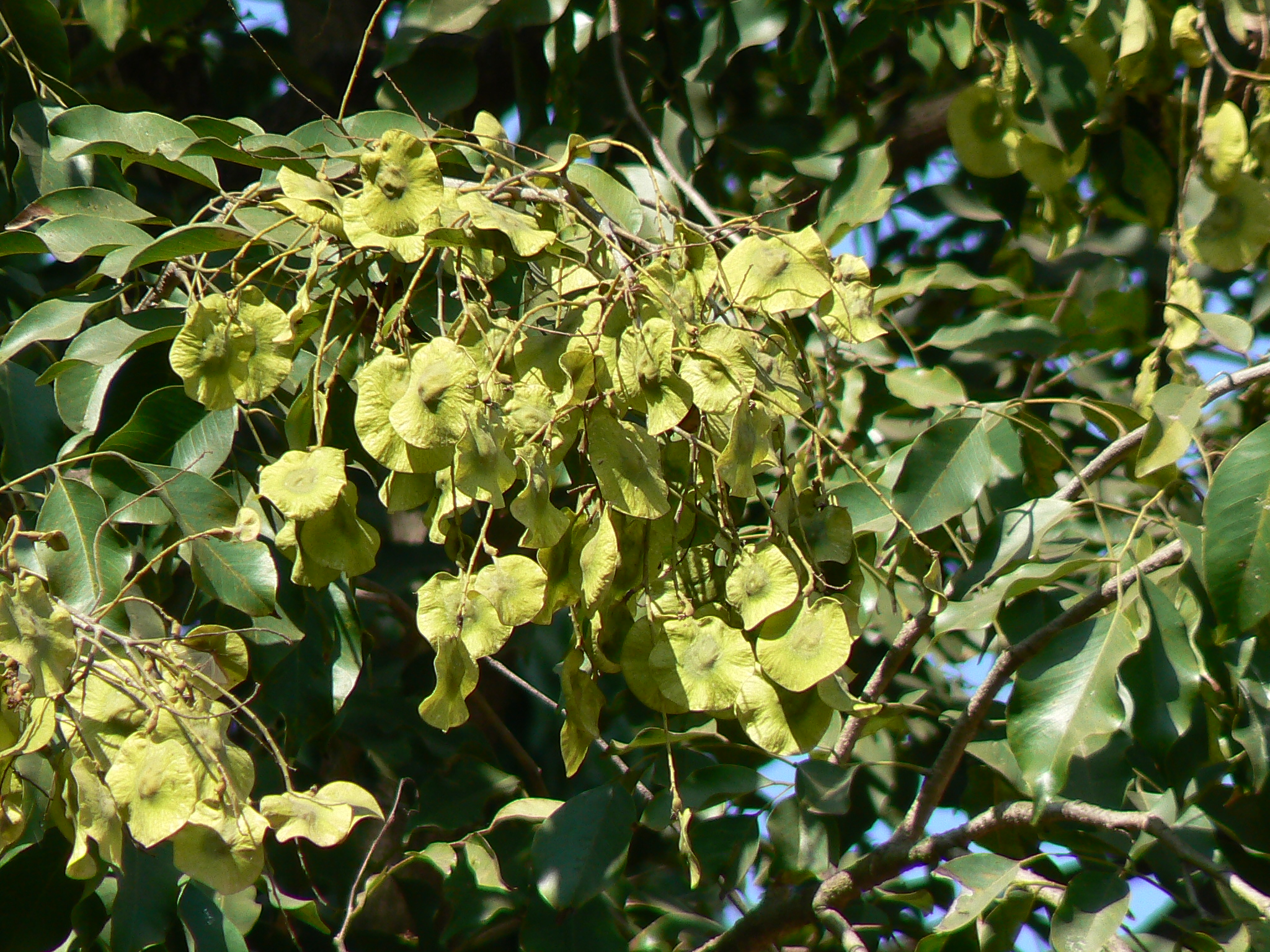 Fabaceae (pea, or legume family) » Pterocarpus marsupium ter-oh-KAR-pus -- from the Greek pteron (wing) and karpos (fruit) ¿ mar-sue-PEE-um ? -- from Latin, for a pouch or a bag commonly known as: East Indian kino, Indian kino, Malabar kino • Bengali: পিয়াল গাছ piyala gacha • Gujarati: બીયો biyo • Hindi: बिया biya, विजयसार vijaysaar • Kannada: ಹೊನ್ನೆಮರ honnemara • Konkani: असण asan • Malayalam: വേങ്ങ veenga • Marathi: बिबी bibi, बिजा bija, बिवळा or बिंवळा bivala, पालेआसण paale-asan, पापडी papdi • Nepalese: बिजयसार bijaysar, बिजयशाल bijayashal, वन्धूकपुष्प vandhuk pushp • Oriya: bijja, piyasalo, ପିତଶାଳକ • Sanskrit: असनः asanah, बन्धूकपुष्पः bandhukapushpa, जीवकः jivakah, महासर्जकः mahasarjakah, पीतसालकः pitasalakah, प्रियकः priyakah • Tamil: அசனாமிர்த asanaamrta, உதிரவேங்கை utira-venkai, வேங்கை venkai • Telugu: వేగి vegi • Urdu: bijasar, dam-ul-akhwain Native to: India, Nepal, Sri Lanka References: NPGS / GRIN • M.M.P.N.D. • ENVIS - FRLHT